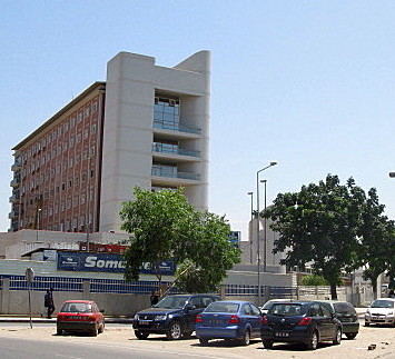 Maternidade Lucrécia Paím, Luanda, Angola